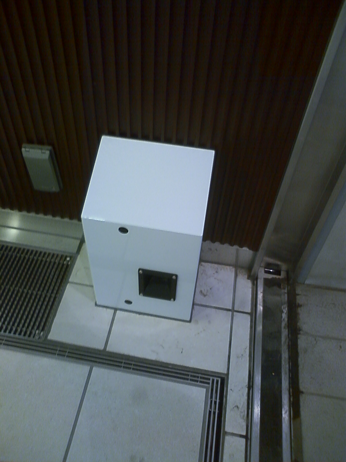 トツカーナのねずみ撃退装置です。